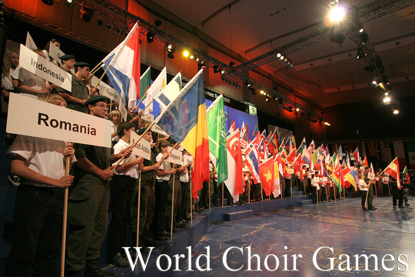 世界合唱比赛在奥地利举办